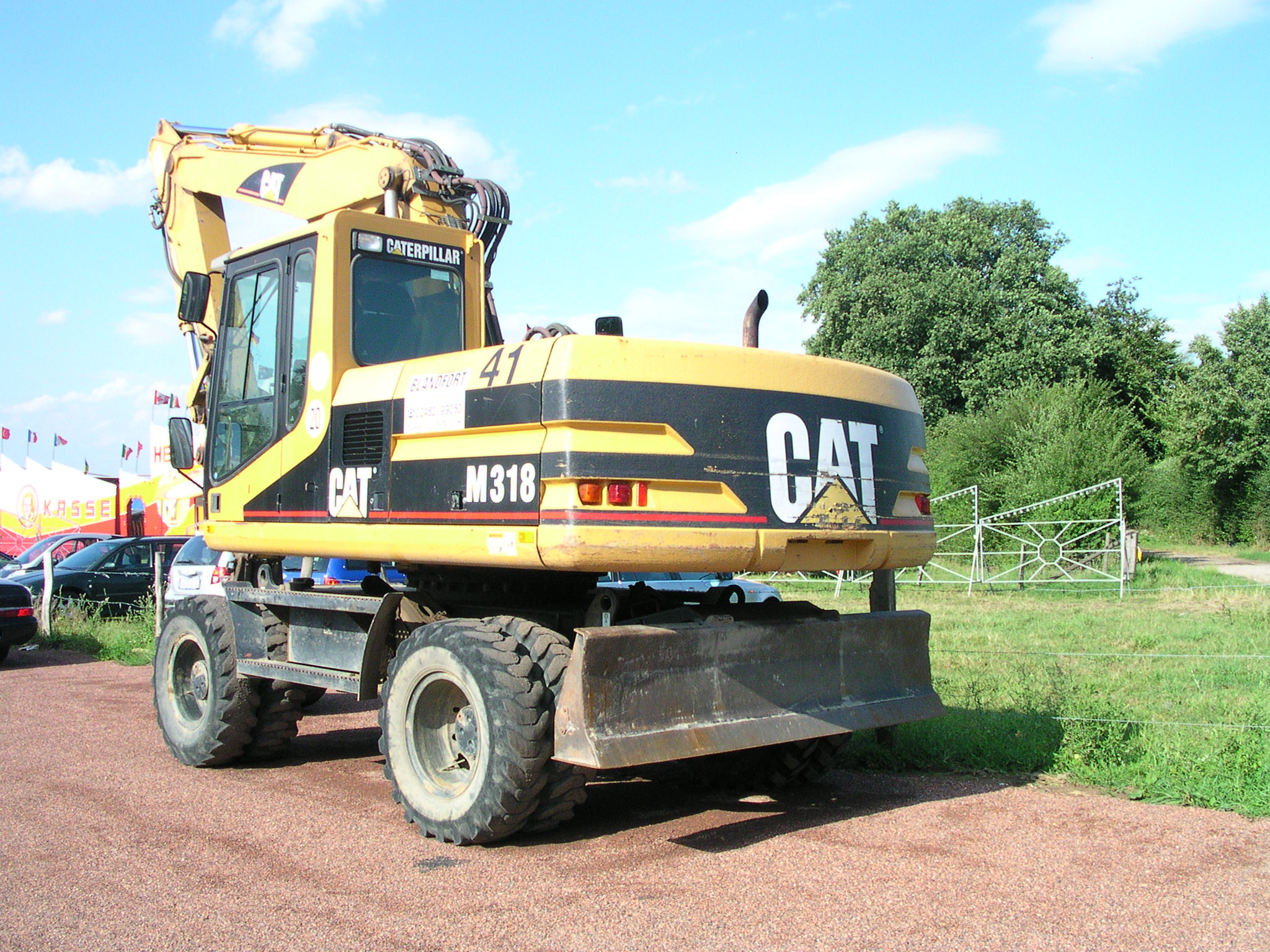 Caterpillar M 318, Baujahre 1995-2002, 17-18 t, 100 kW